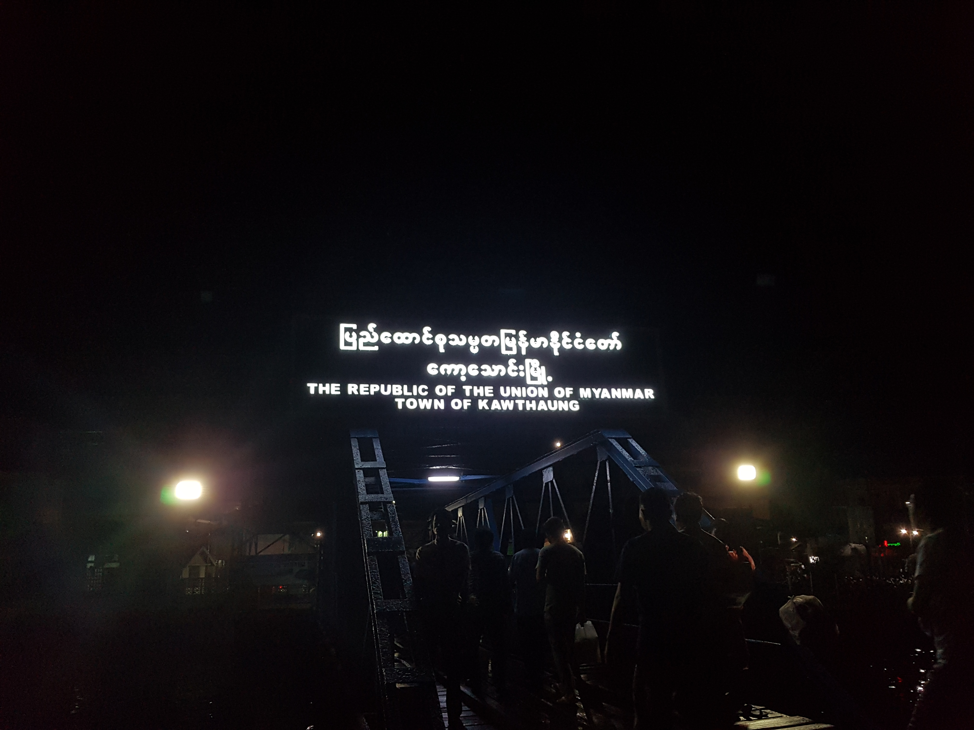 မြို့အဝင်(ညပိုင်း)